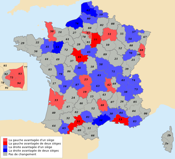 Évaluation, par Regards Citoyens, de l'impact politique du redécoupage électoral français basé sur l'exploitation de données publiques électorales.